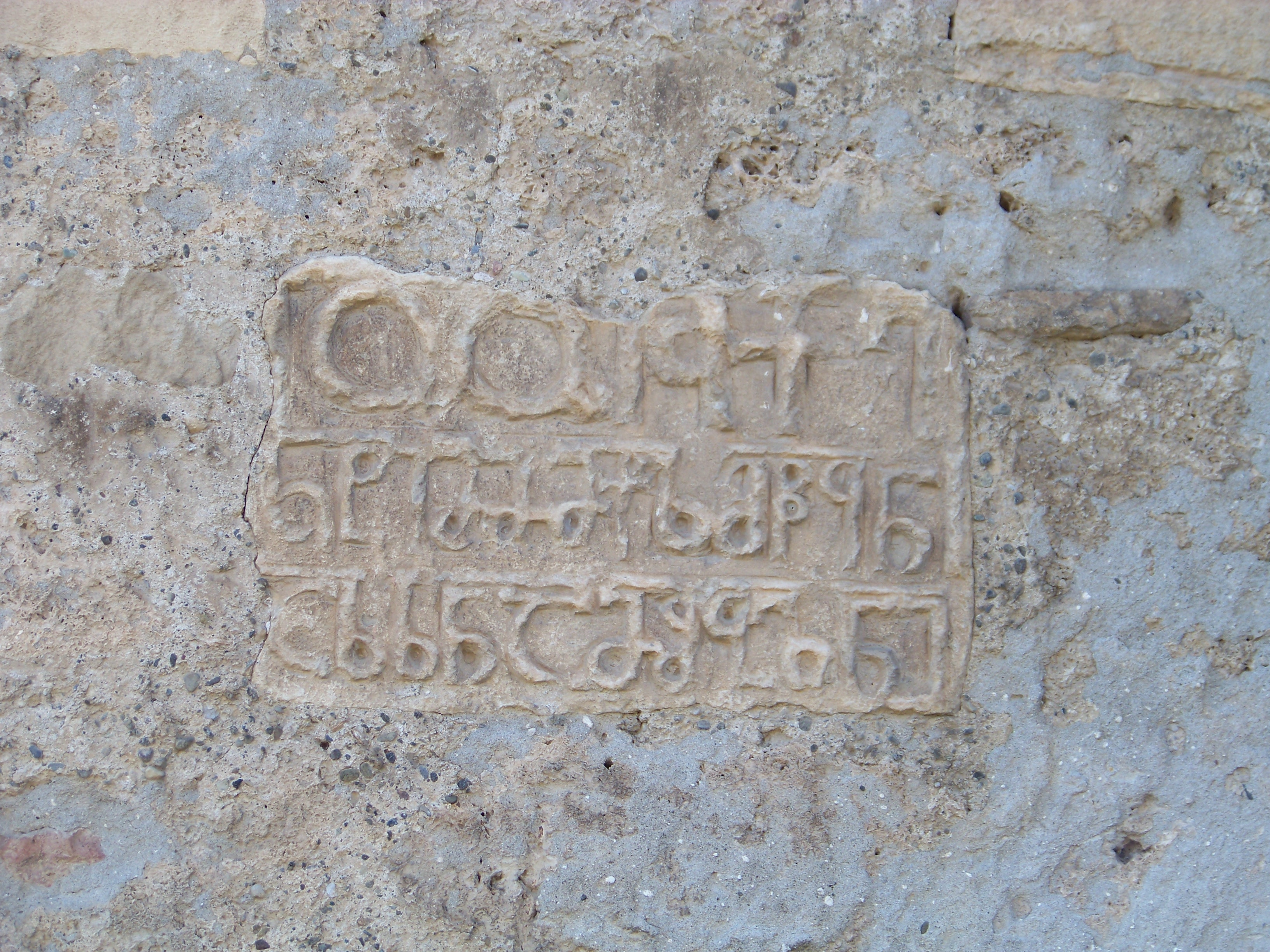 ურბნისის სიონი, გალავანი, სამრეკლო, აბანო, მარანი, წყალსადენი